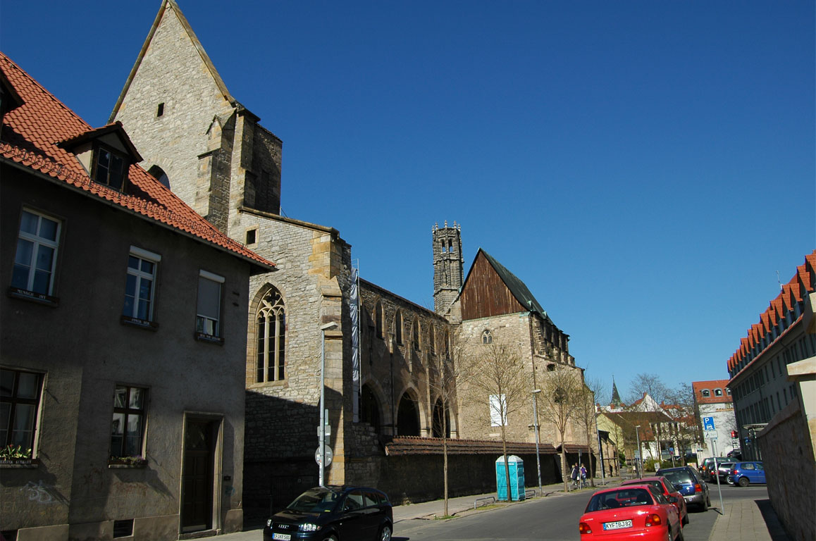 Barfüßerkirche (errichtet 1231) in der Barfüßerstraße in Erfurt